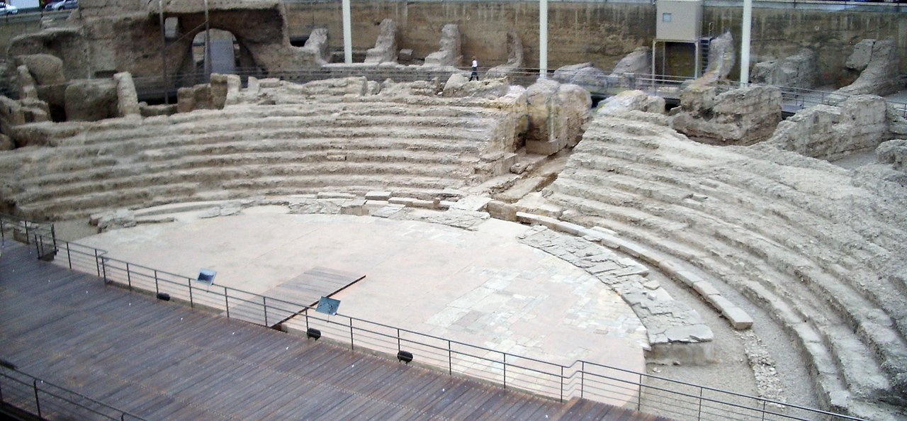 Teatro_Romano_Cesaraugusta-vista_desde_arriba